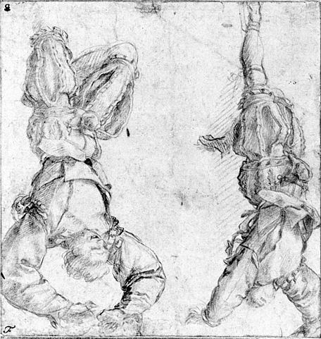 Esquisse d'Andrea del Sarto